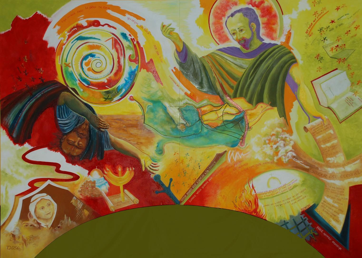 Bernadette GAY-JEANGUYOT Huile sur bois. Eglise de Battrans (Haute-Saône)